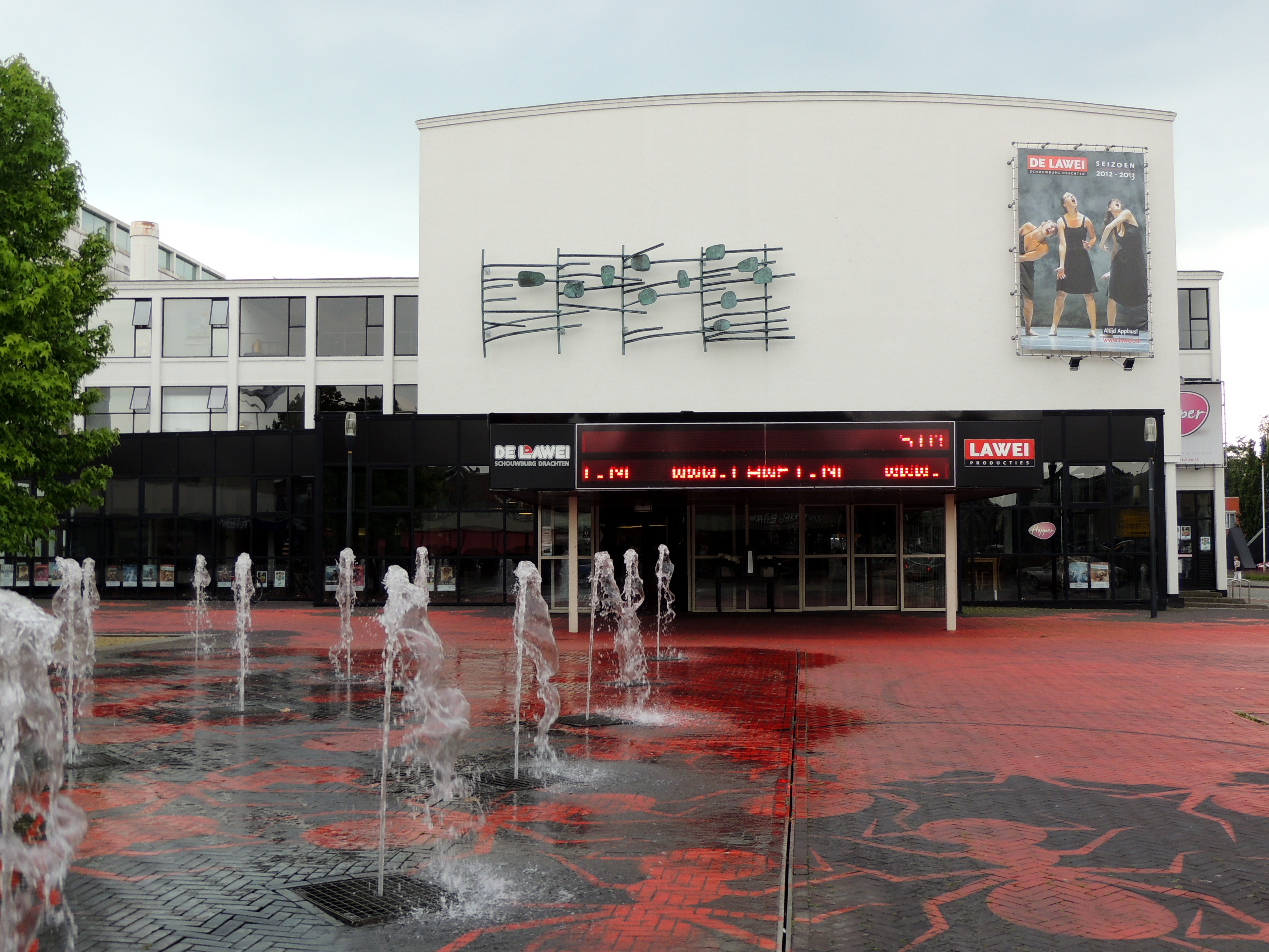 De Lawei in Drachten (uiterlijk tot september 2013)